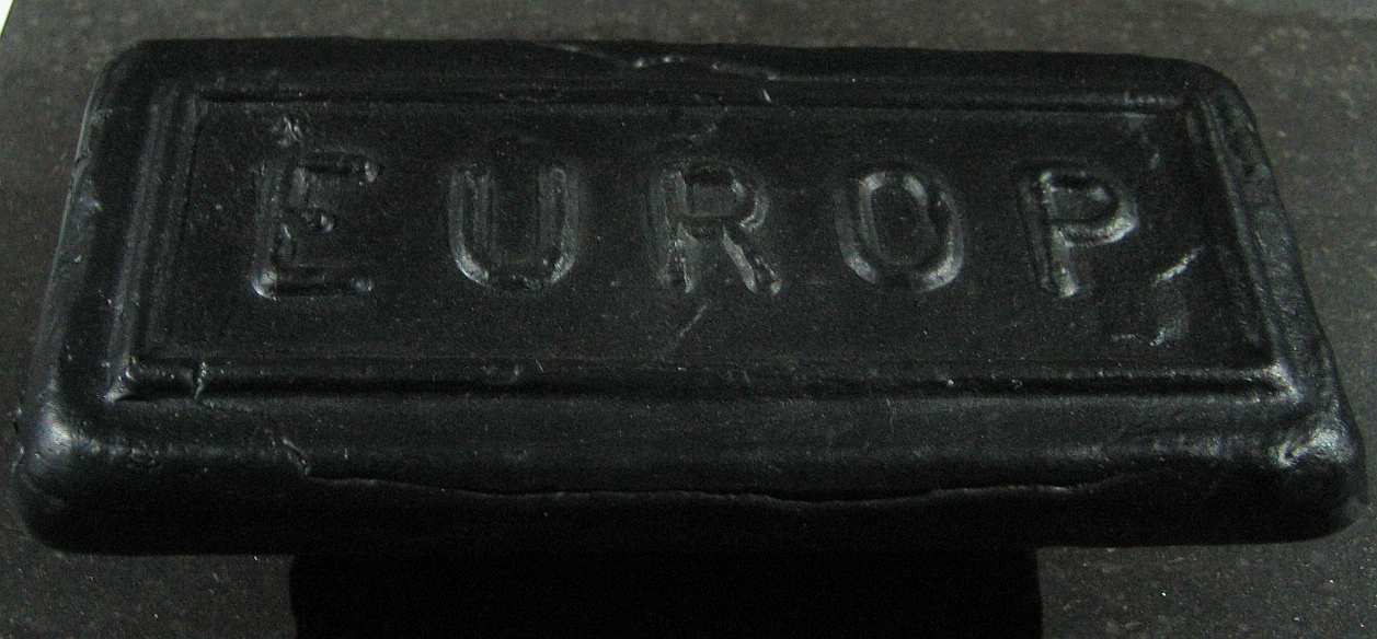 Plack, déi aus dem Éischten Europäesche Stol gegoss gouf.